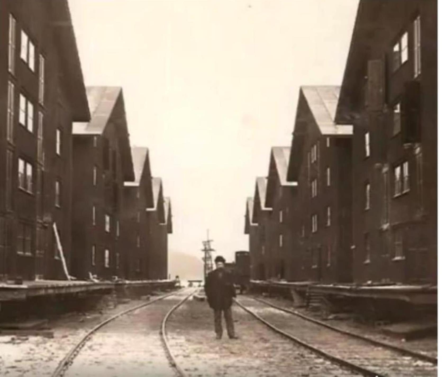 Ст. Лахденпохья.